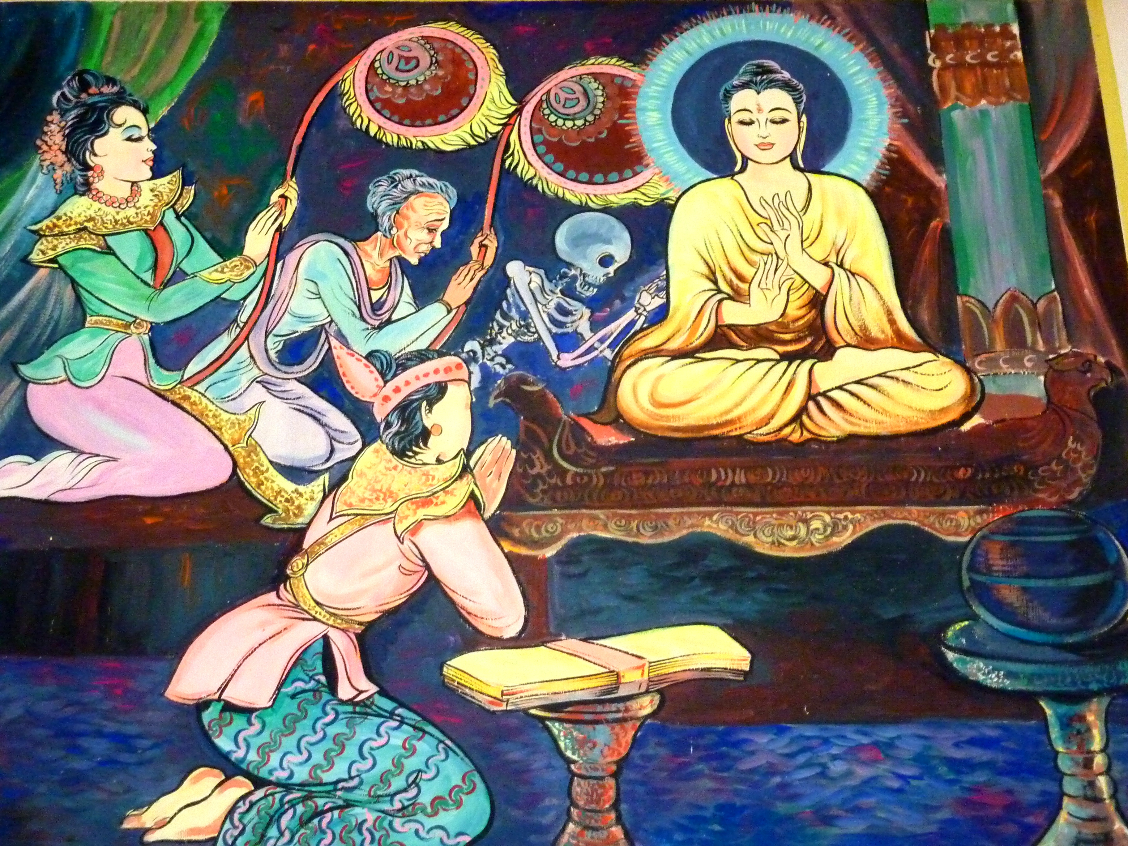 056 Teaching Impermanence, at Wat Olak Madu, Kedah